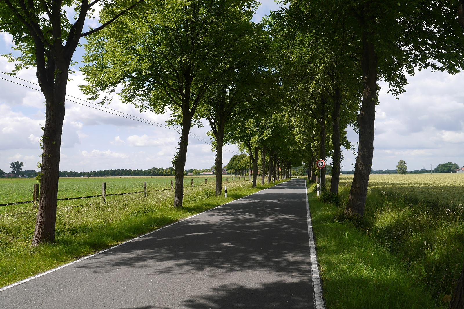 Allee 'In den Gründen' in Herzebrock-Clarholz (Samtholz)